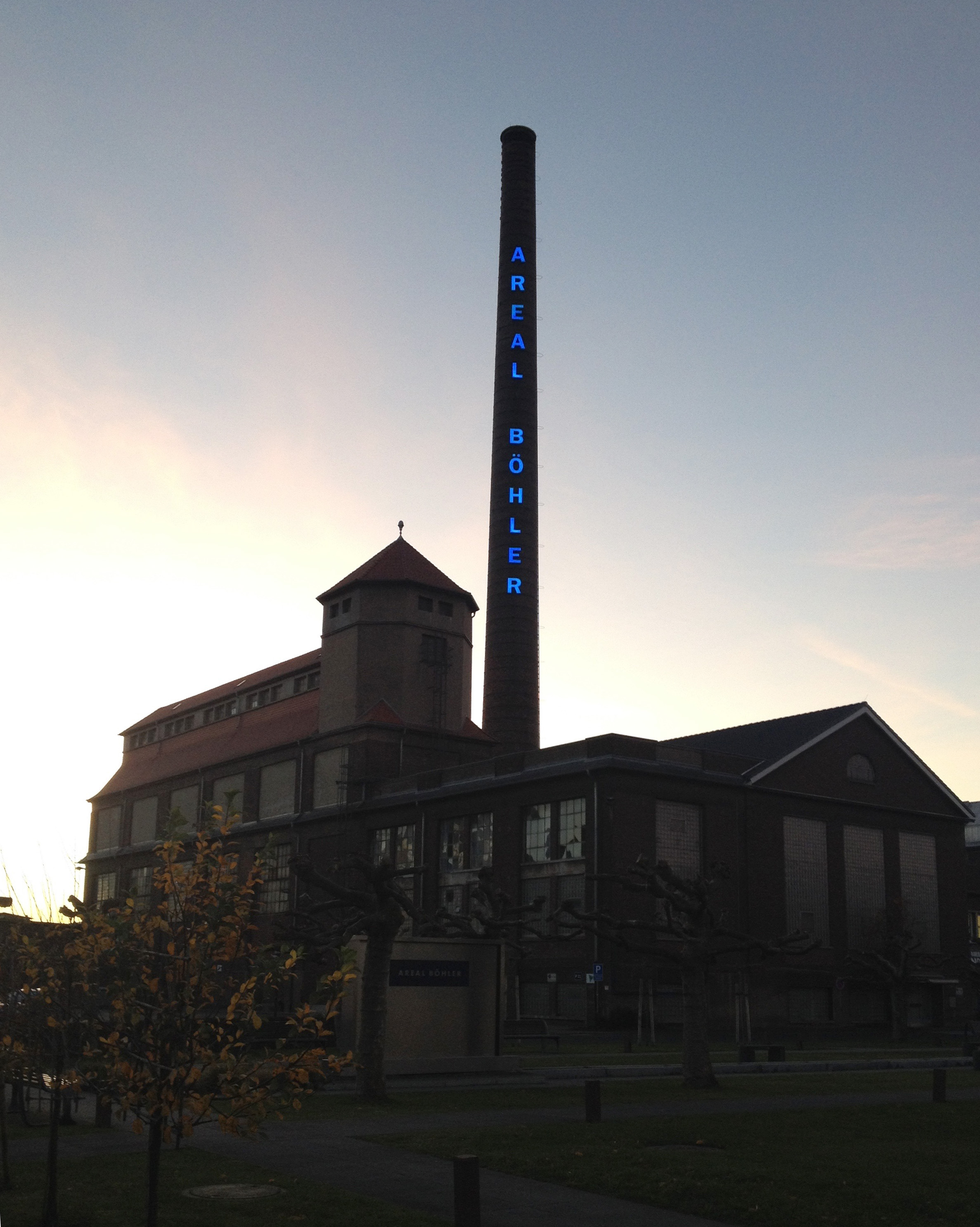 Areal Böhler, Januar 2017, Das Alte Kesselhaus (Kraftzentrale): Kesselhaus, Maschinenhaus und der Backstein-Schornstein bilden eine Einheit. Vom historischen Kessel- und Maschinenbestand jedoch ist nichts mehr erhalten. Geschichte: 1914 kaufte die österreichische Fa. Böhler das Büdericher Grundstück und begann ein Jahr später mit der Stahlproduktion der Böhler-Werke. Das Pförtnerhaus wurde auf Düsseldorfer Grund errichtet, so dass die neue Firma die begehrte Düsseldorfer Postanschrift erhielt. Die Stahlproduktion lief insbesondere in den beiden Weltkriegen auf Hochtouren. Ende 1970 waren noch ca. 4500 Menschen in den Werken beschäftigt. Die Produktion in der Schmiede und im Stahlwerk wurde 1993 eingestellt. Heute: Lagerplatz, Weiterverarbeitung von Stahlerzeugnissen, Vermietung nicht mehr genutzter Hallen und Flächen unter dem Namen "Areal Böhler", Aktivitäten und Ateliers von Künstlern.